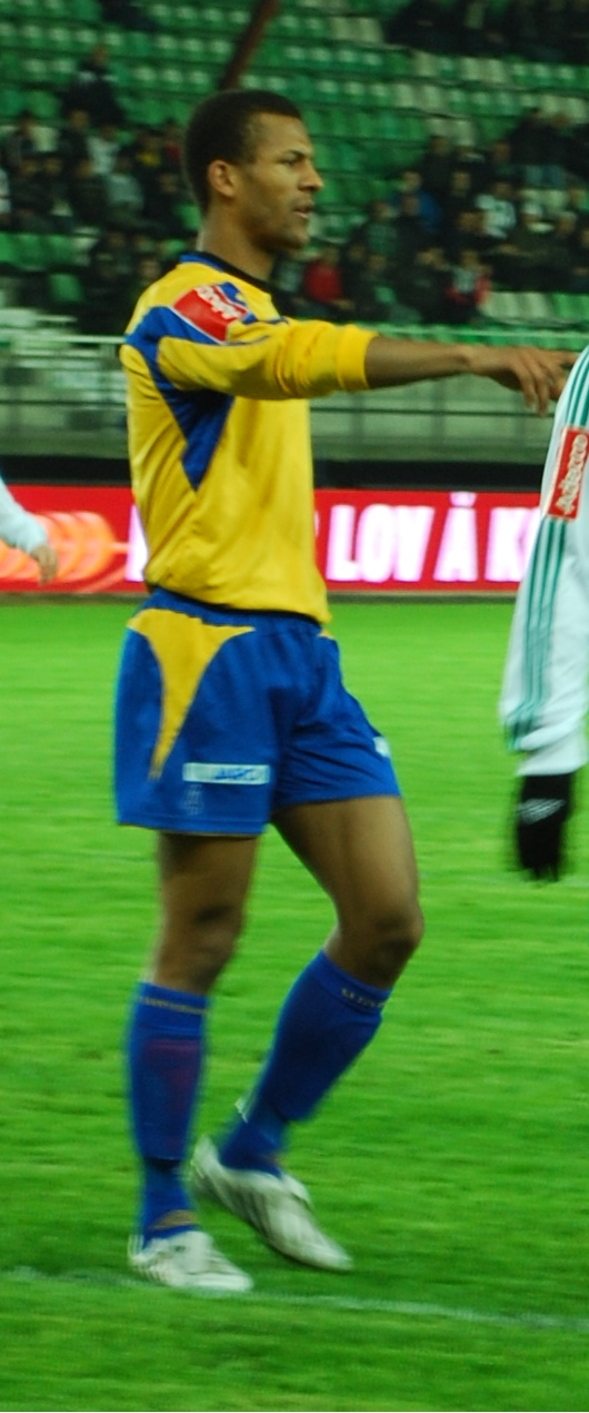 Yaw Ihle Amankwah, fotballspiller hos Alta IF.